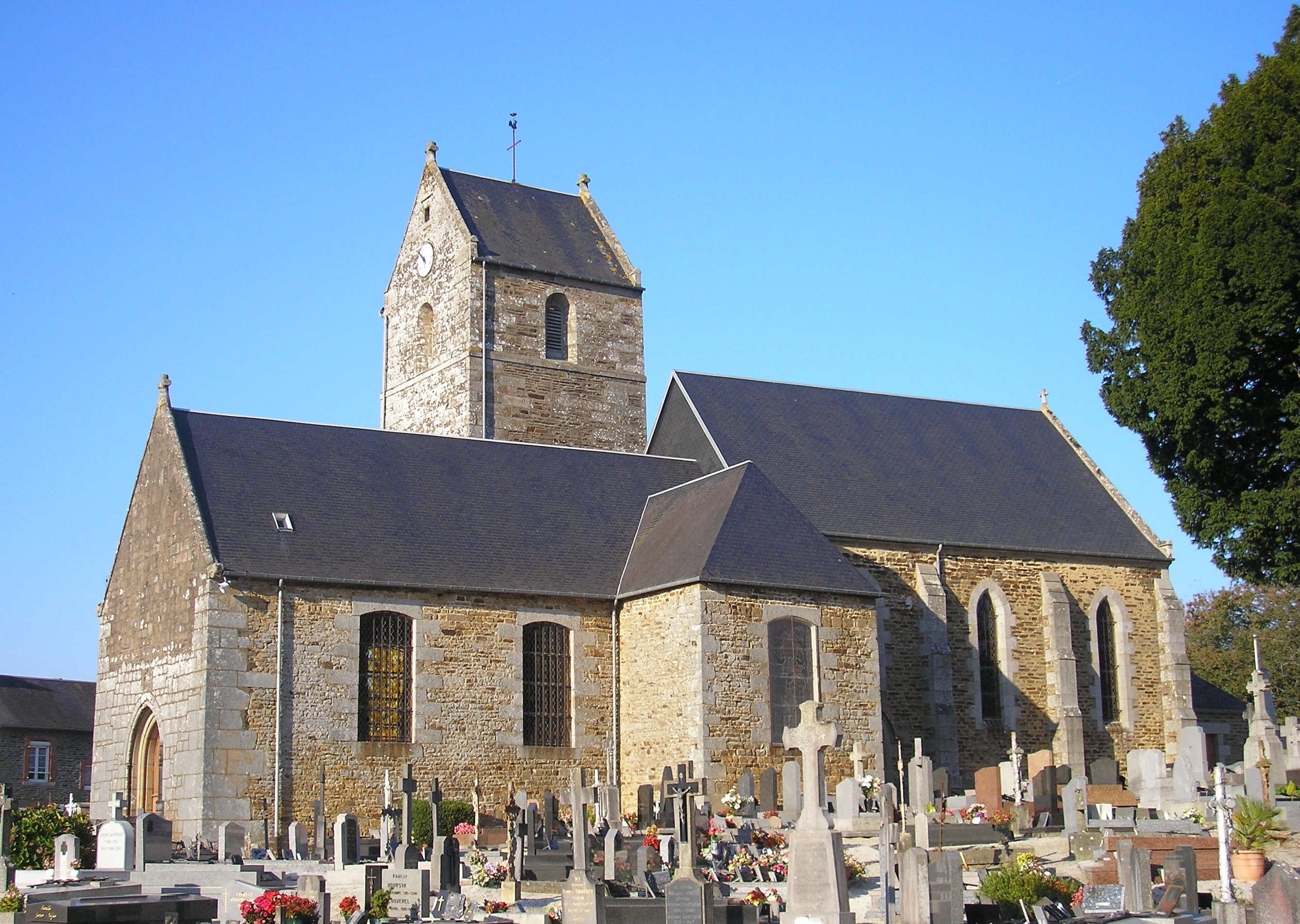 Parigny (Normandie, France). L'église.